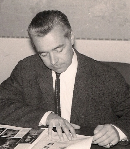 Porträt des früheren Chefredakteurs der ARD Tagesschau Sitz Hamburg